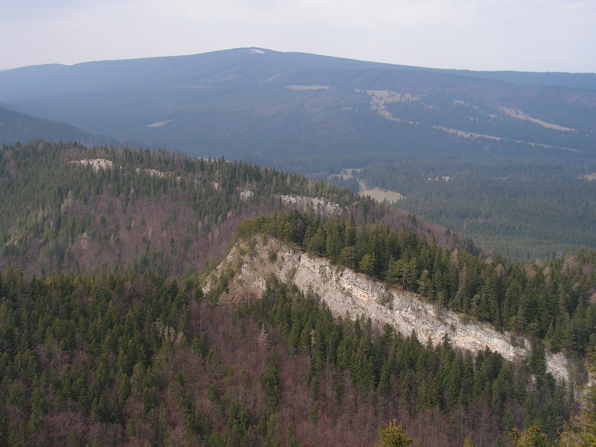 Na pierwszym planie Czaplowy Wierch, za nim Jeżowy Wierch, na ostatnim planie Skoruszyna.